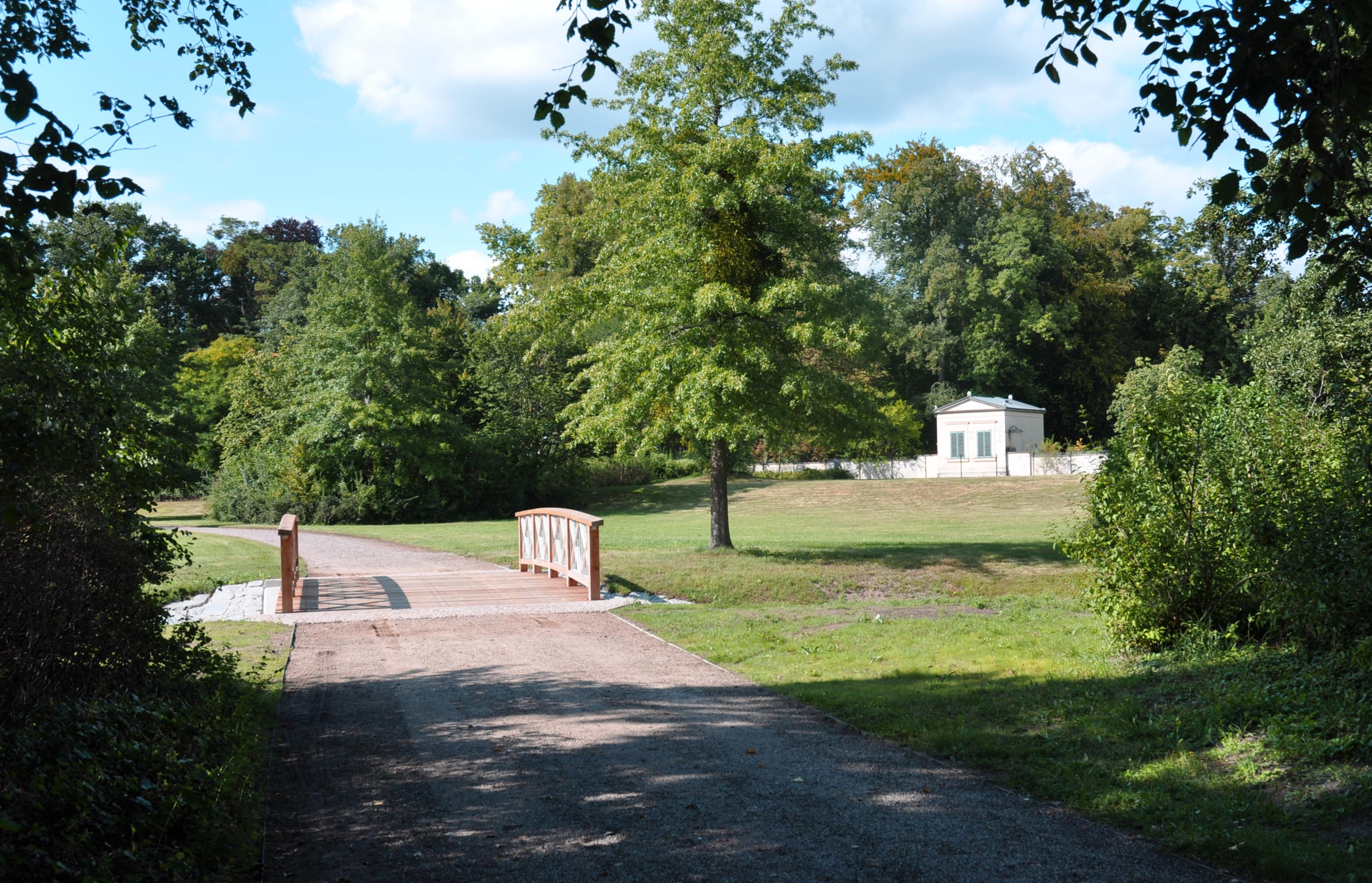 Im Jagdschlossgarten Klein-Glienicke